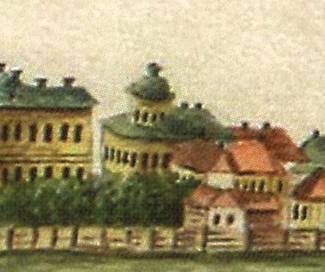 П. Е. Размахнин. Вид Перми. 1832 год. Фрагмент со зданием мужской гимназии.